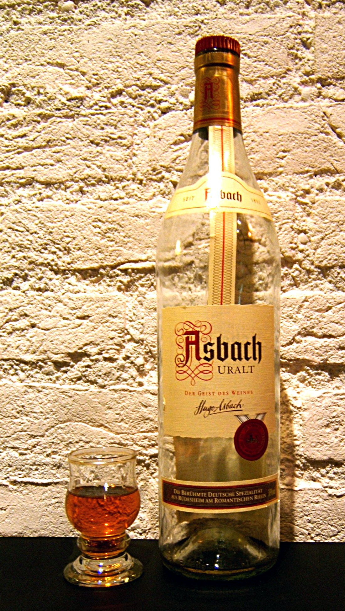 Asbach Uralt, lege fles, glas half vol